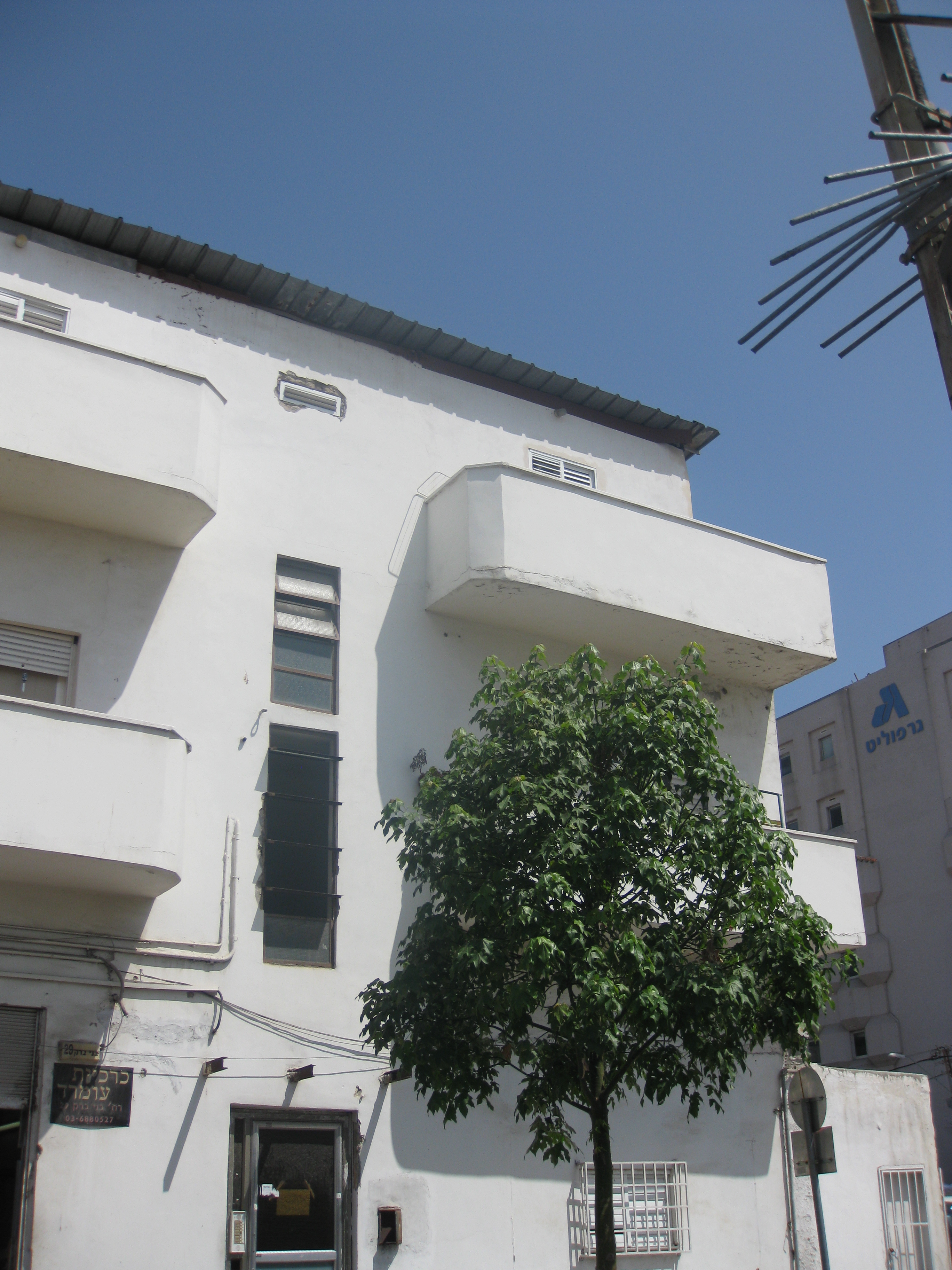 International Style buildings in Neve Shaanan מבנים בסגנון בינלאומי בשכונת נווה שאנן